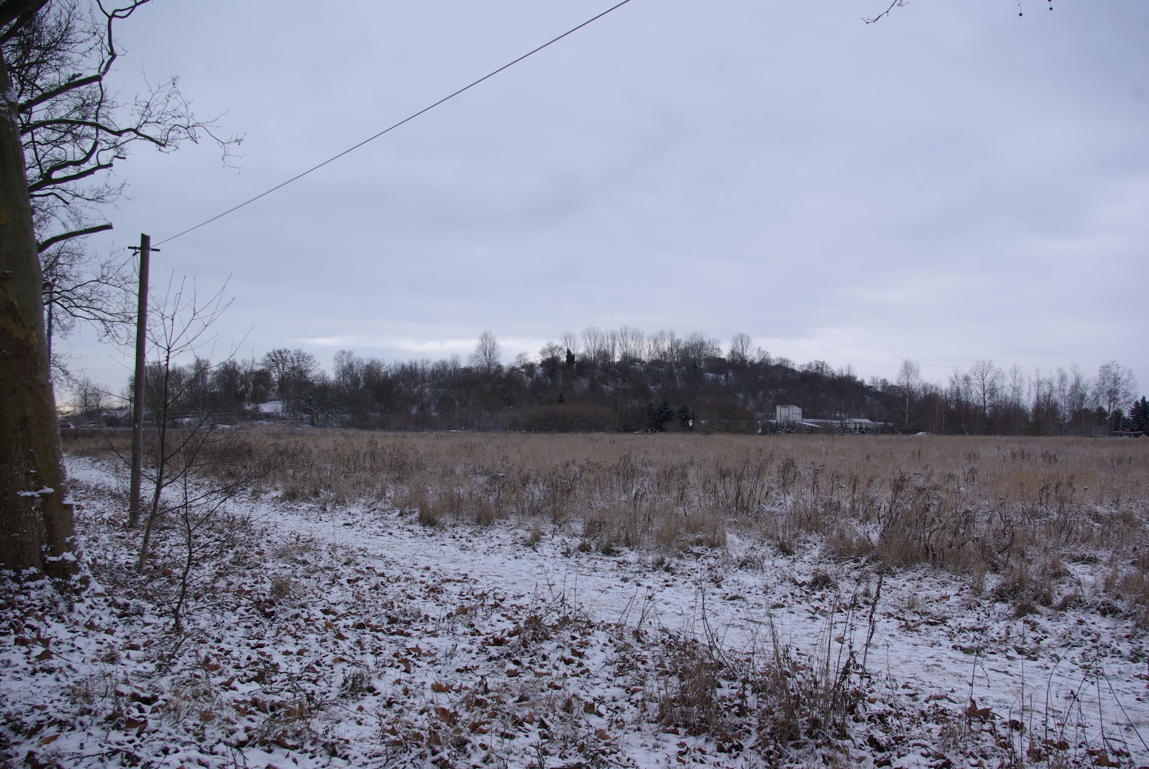 Berlin, Bezirk Neukölln. Der Blick auf den künstlichen Berg Dörferblick. Der Blick geht von Nordost von der Waßmannsdorfer Chausee hin zum Dörferblick (geotag in den exif-daten).